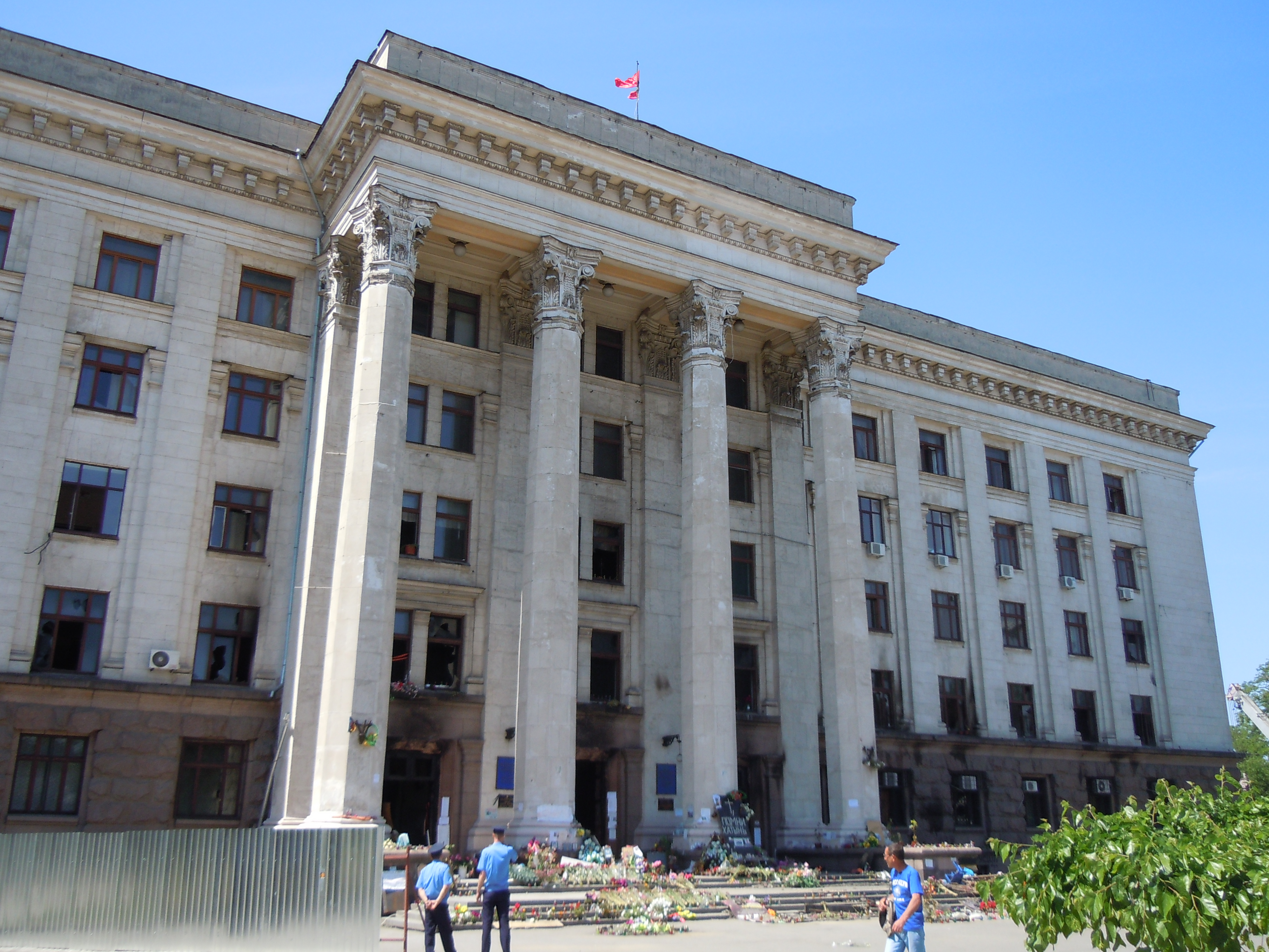 Будинок профспілок Одеської області після пожежі, Одеса, Куликове поле, 1